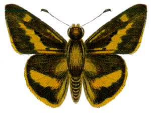 Sabera dobboe autoleon